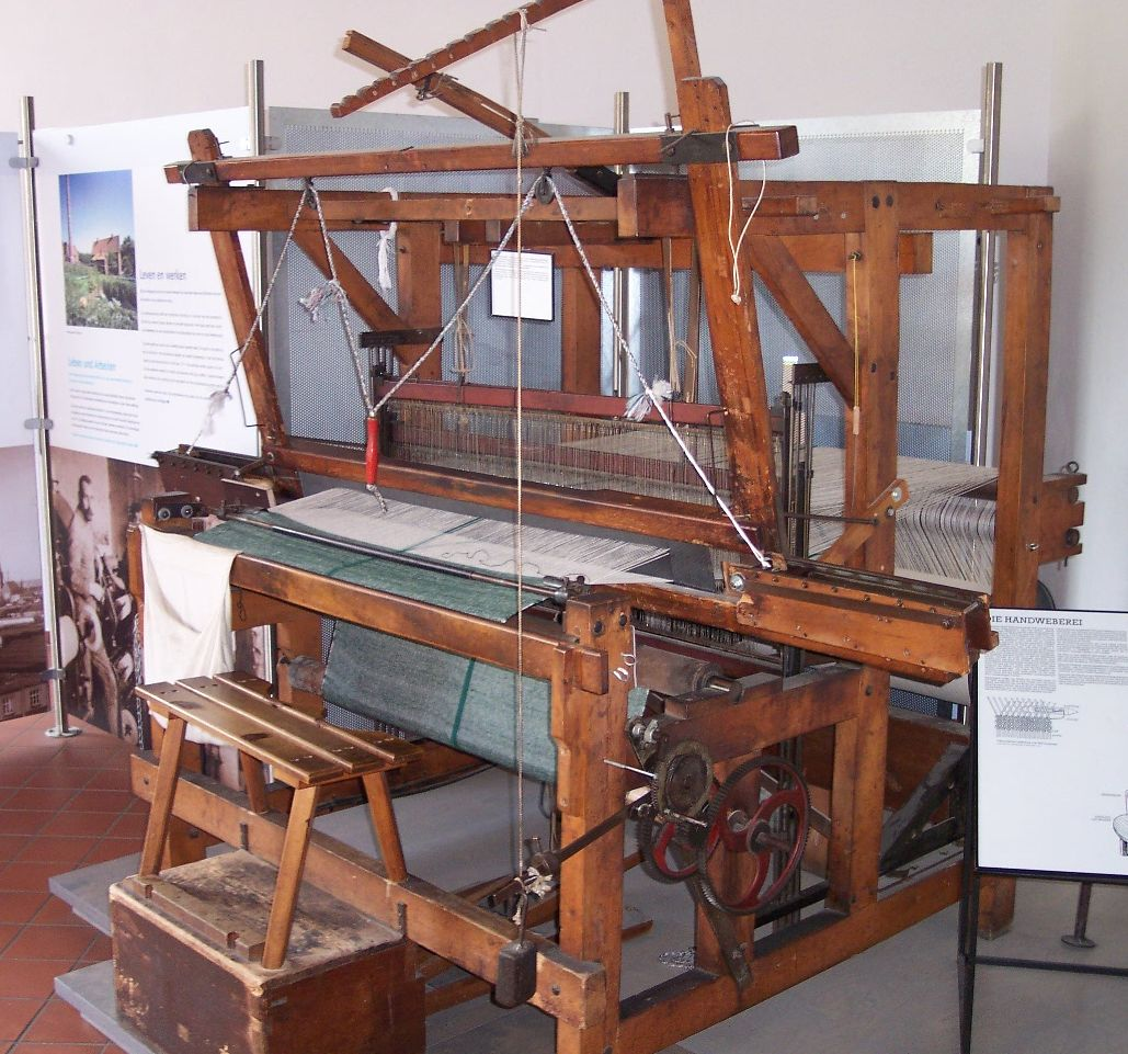 Handwebstuhl